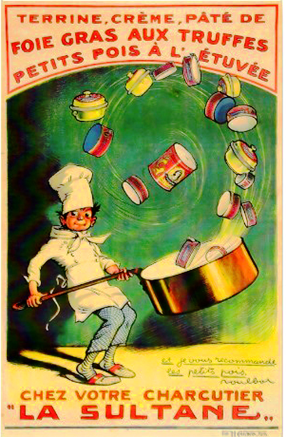 Foie gras aux truffes